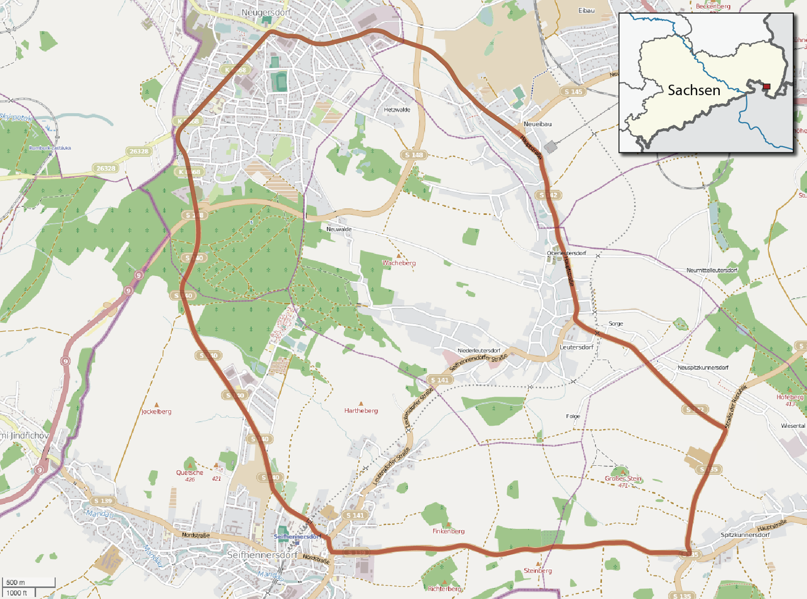 Karte des Oberlausitzer Grenzlandrings